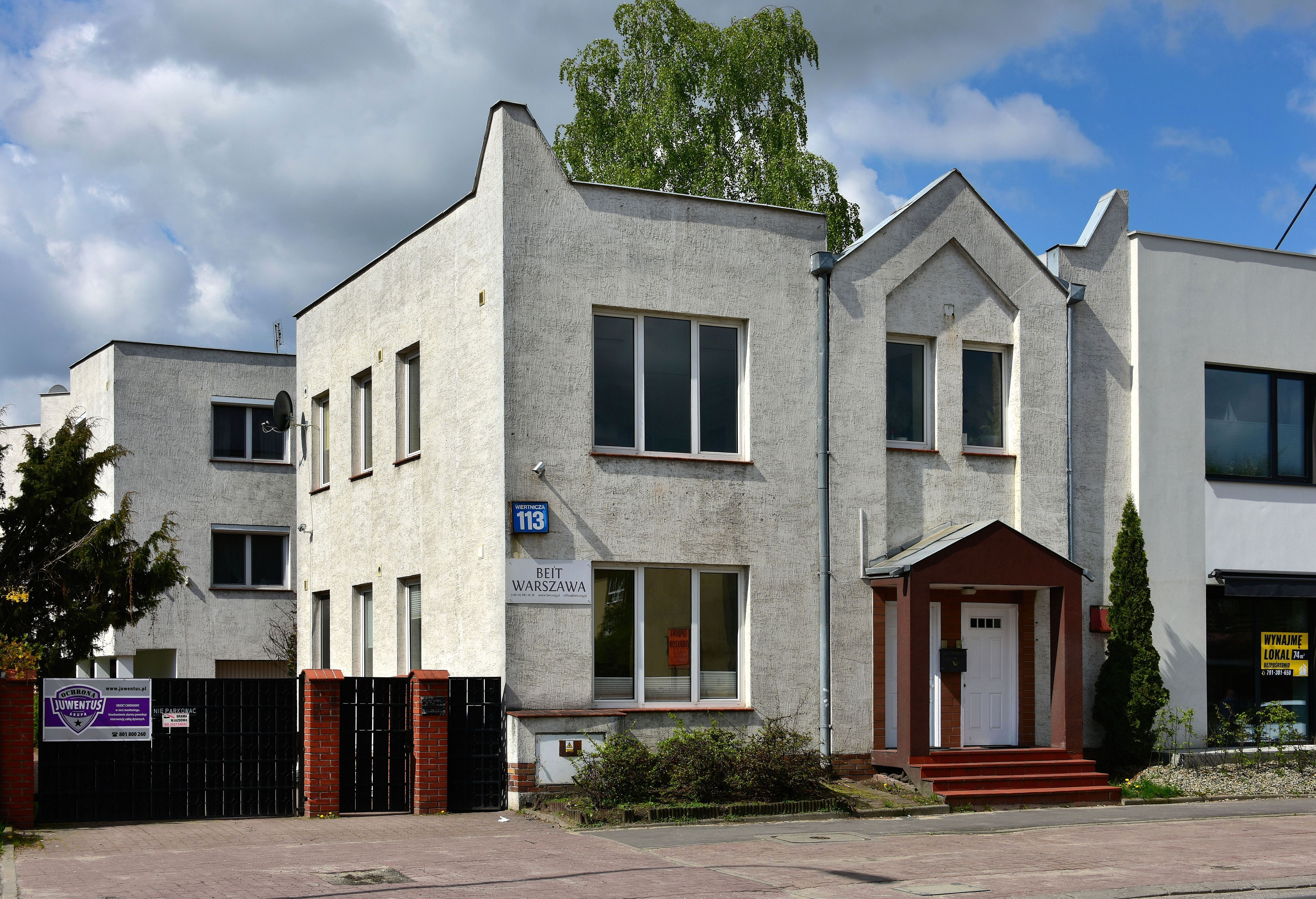 Beit Warszawa przy ul. Wiertniczej 113 w Warszawie